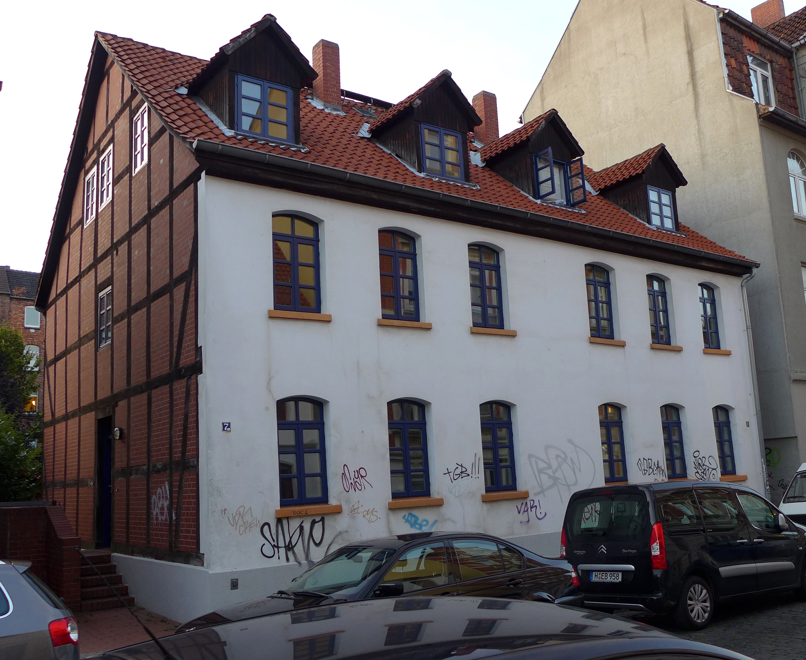 D-Niedersachsen, Hannover, Linden Nord